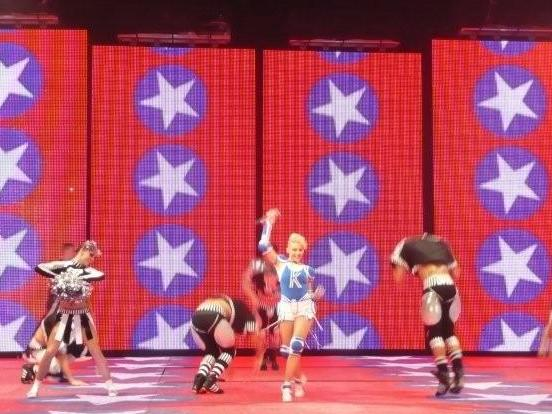 KylieX2008